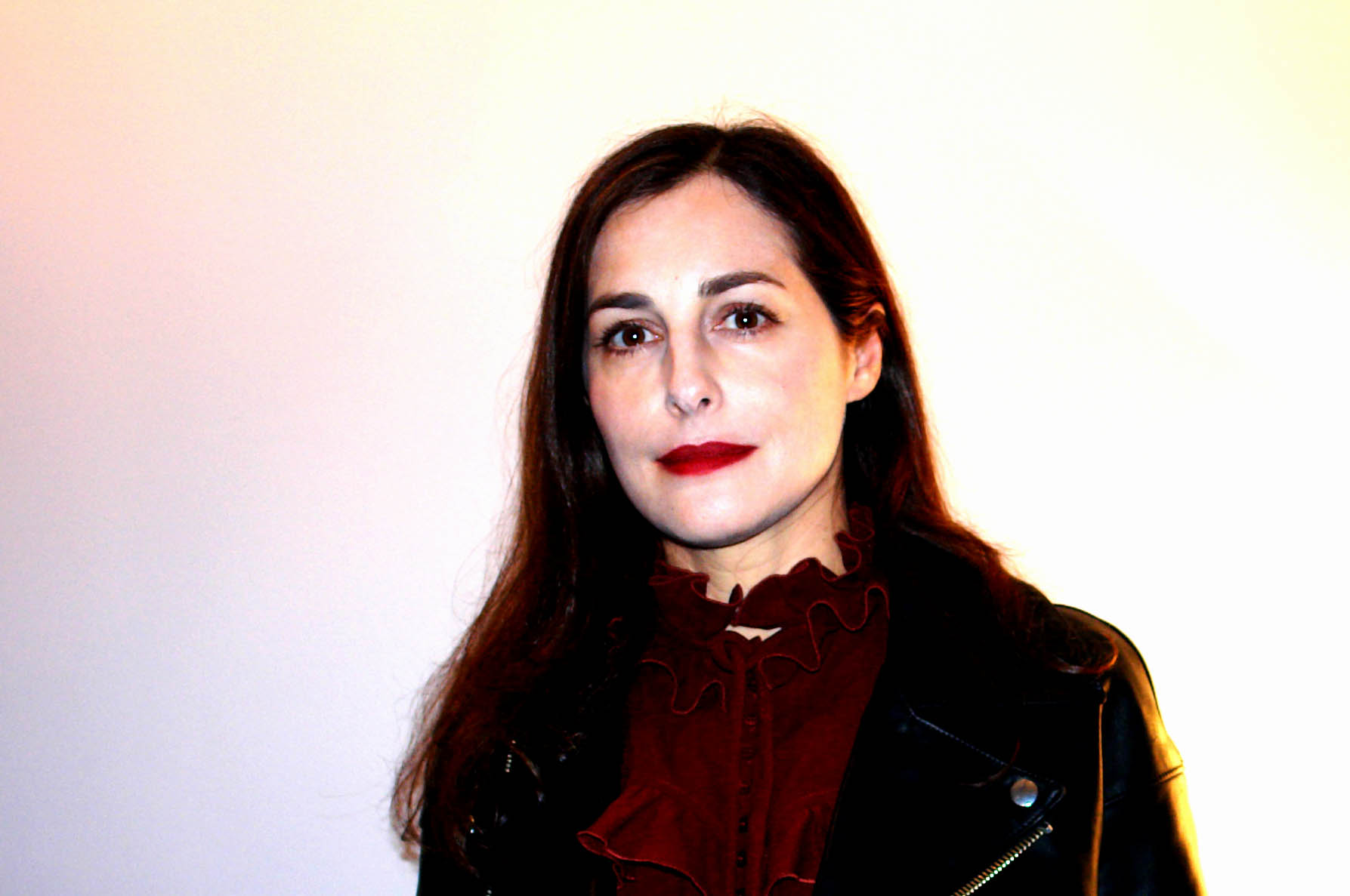 Amira Casar portait de 2012 au Festival international du film francophone de Namur